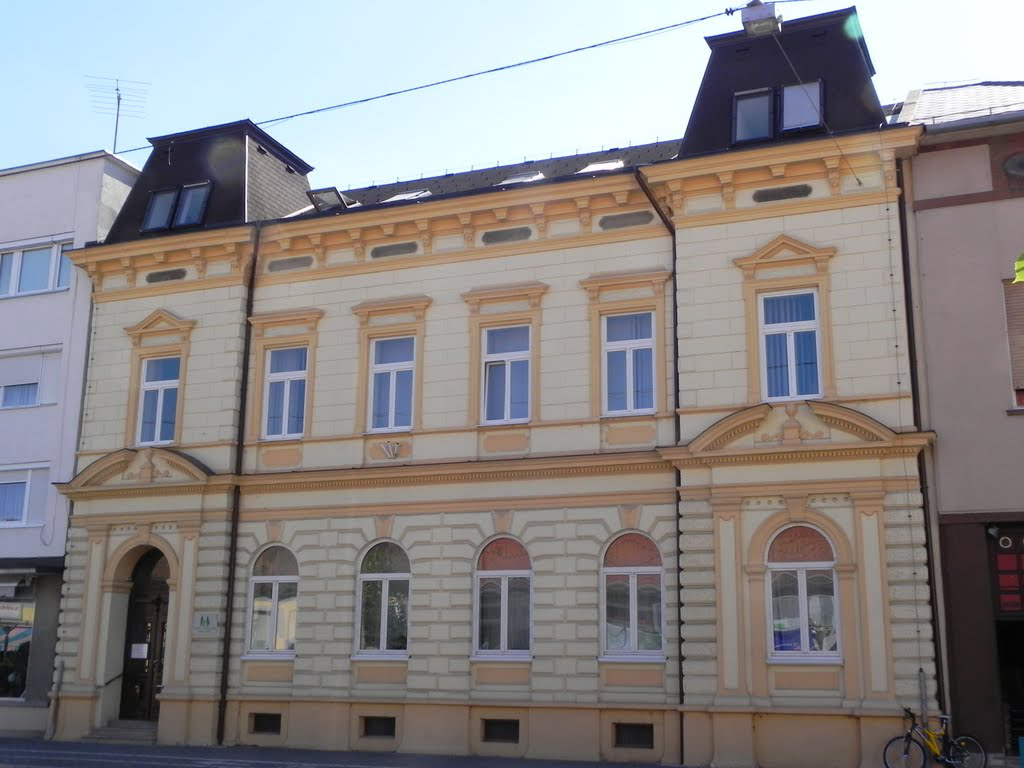 Muraszombati Takarékpénztár - Stavba Murskosoboške hranilnice, zgrajene okoli 1880 (Slovenska cesta, Murska Sobota).